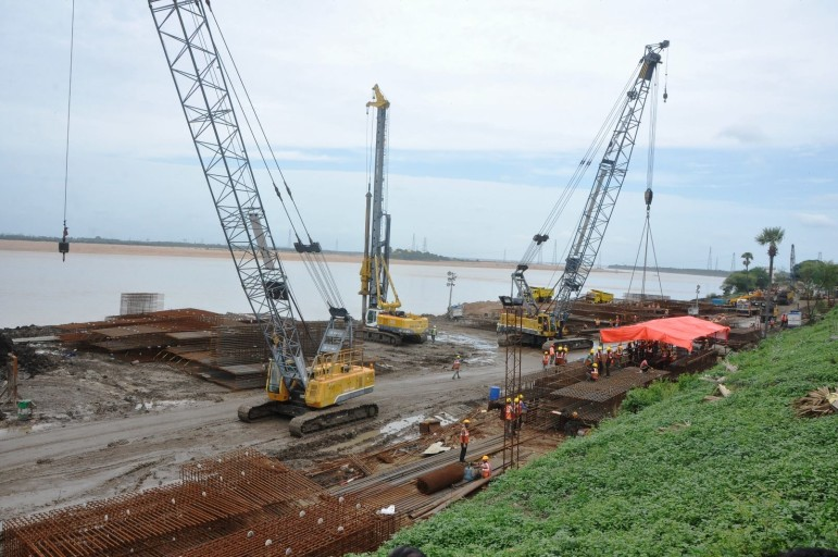 పట్టిసీమ నిర్మాణ సమయంలో